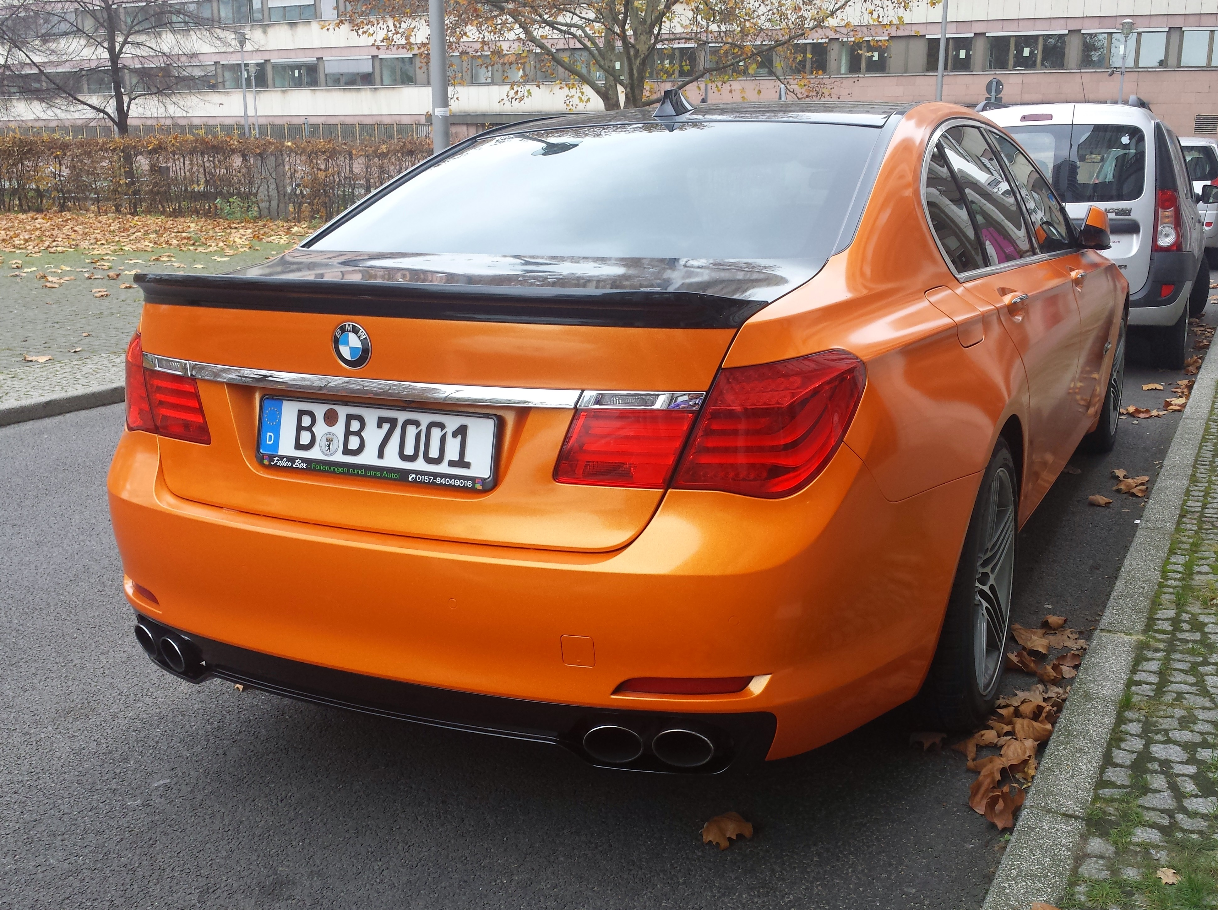 Alpina B7